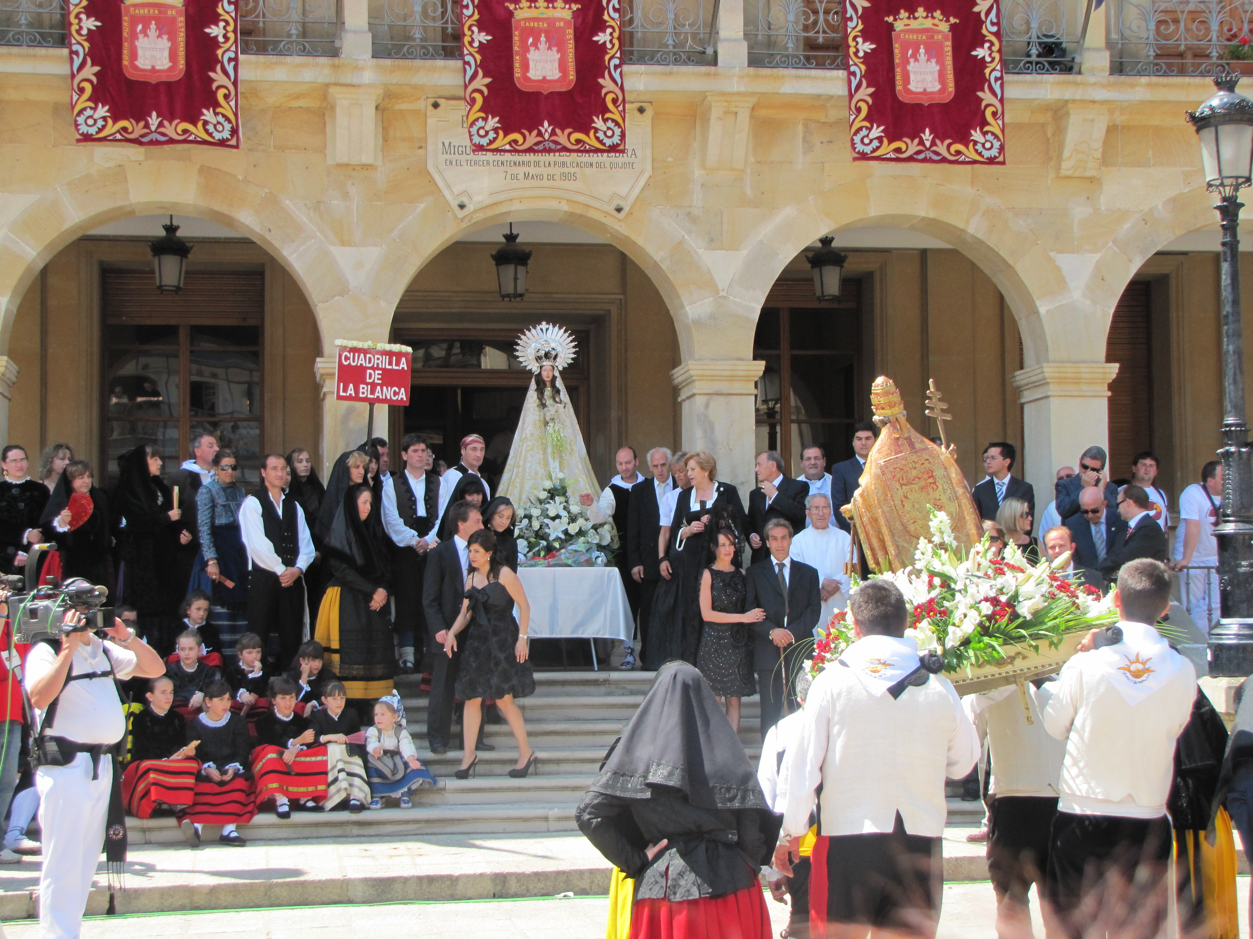 Lunes de Bailas; San Pedro le rinde pleitesía a la Virgen de la Blanca (Soria).